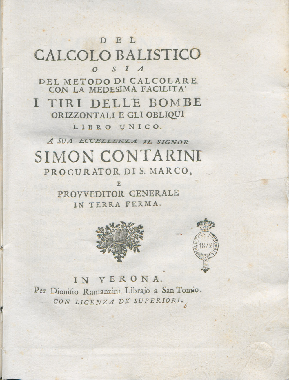 Frontespizio